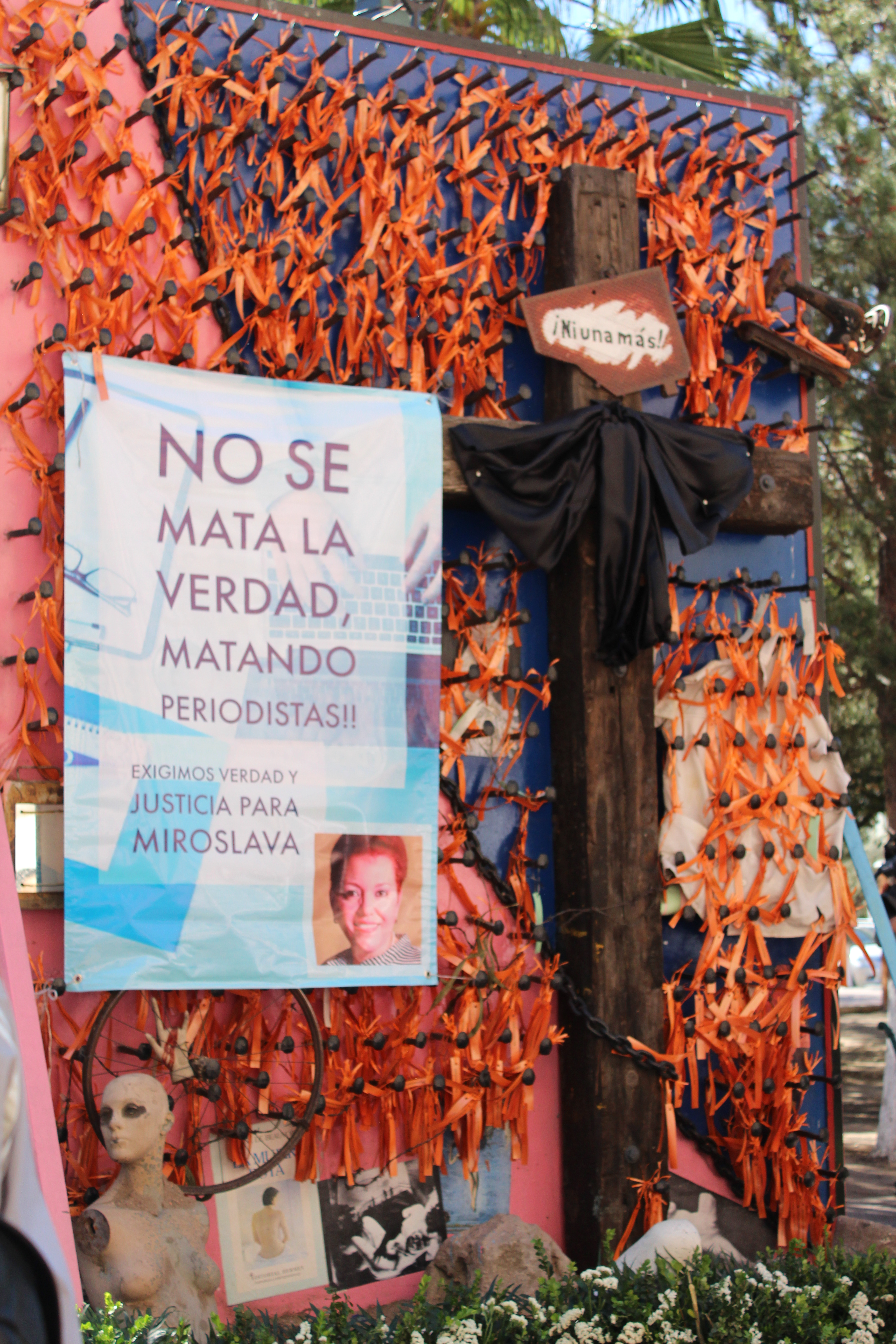 Homenaje a Miroslava Breach Velducea días después de su asesinato, en la Cruz de Clavos en Chihuahua, Chih.